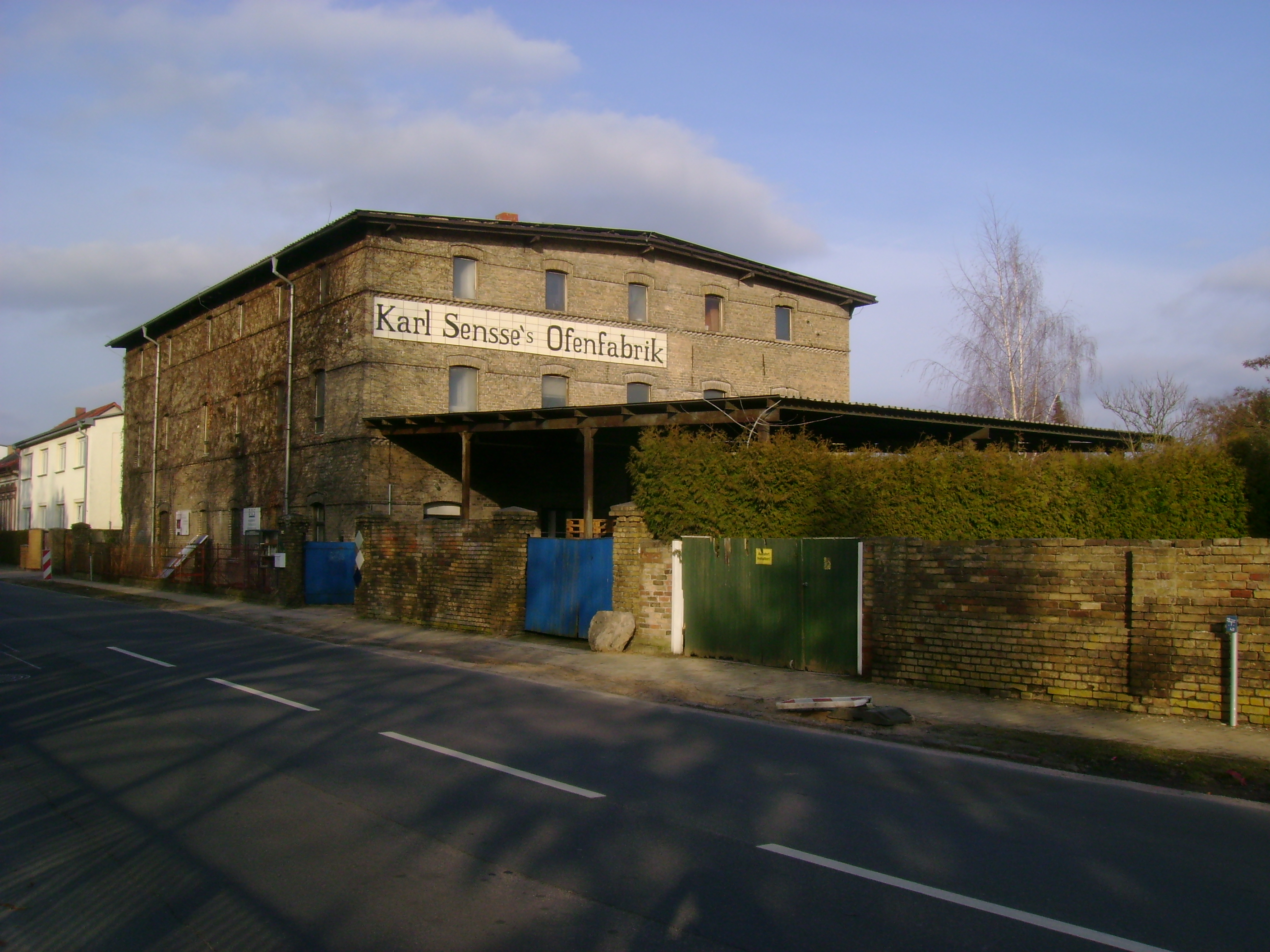 Gebäude der ehemaligen, 1866 gegründeten Karl Sensse Ofenfabrik